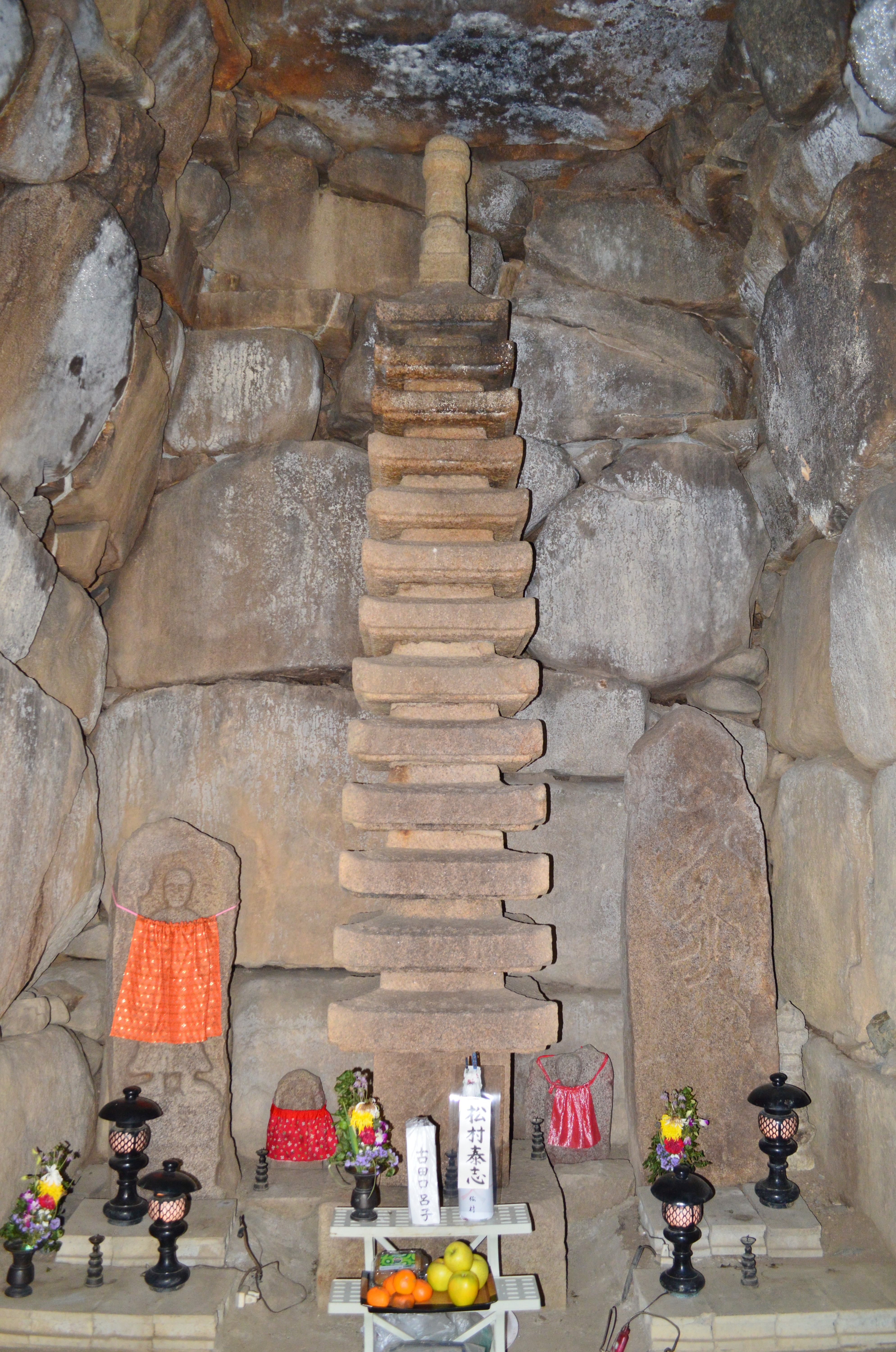 鉢塚古墳 (池田市) 石室玄室内の十三重塔